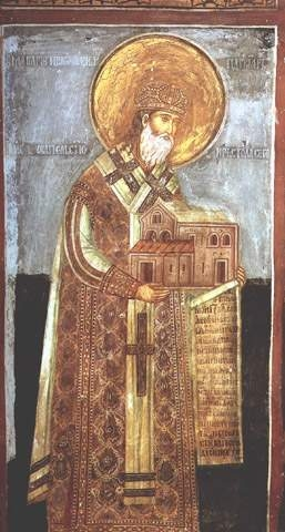 Макарије Соколовић, архиепископ пећки и српски патријарх 1557-1574